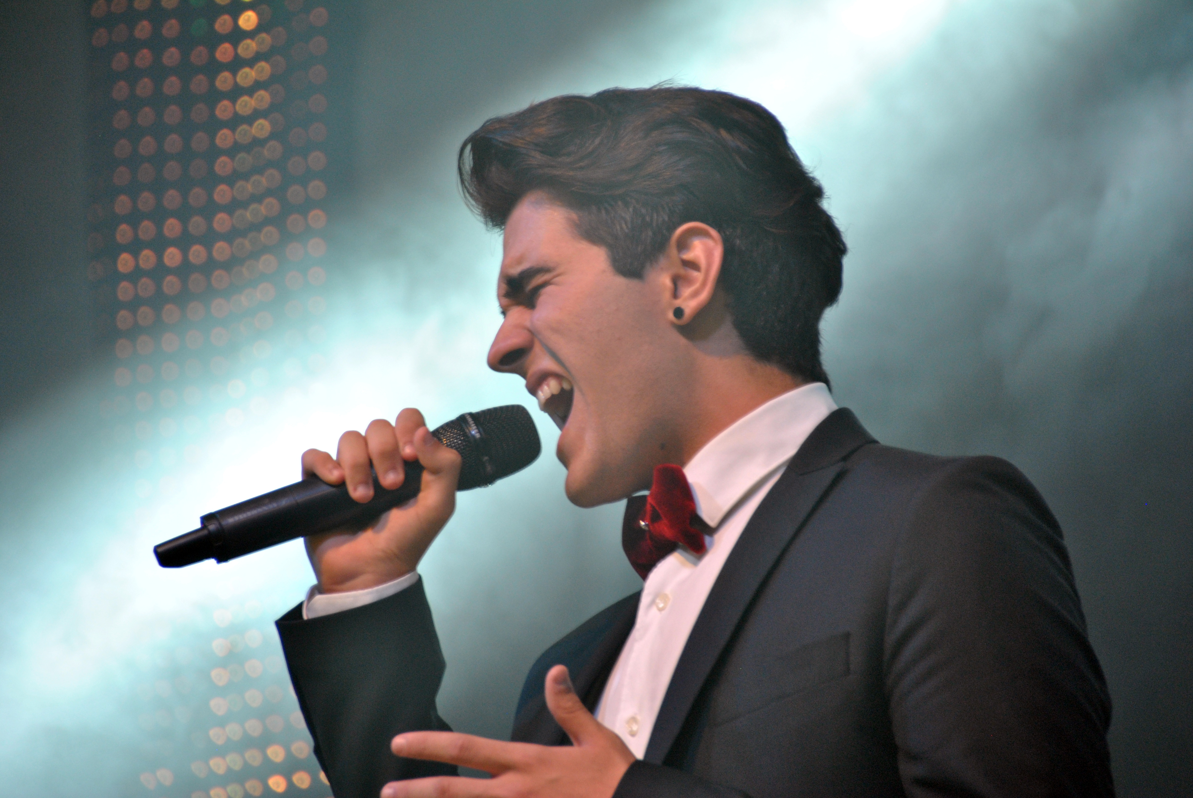 Maverick cantando en Vinaroz. Fue su primera actuación después del programa La Voz.